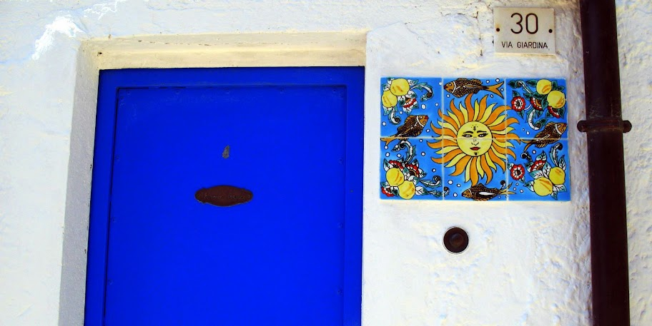 Portopalo (Sicilia)